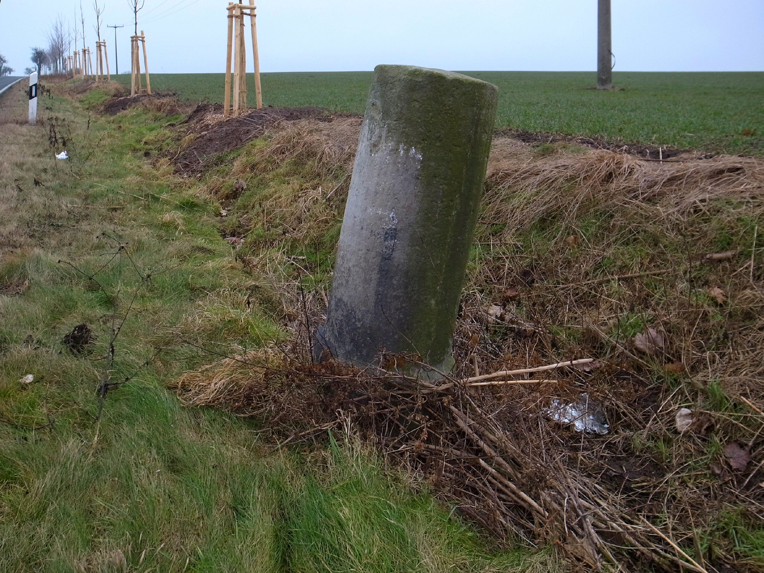 Warmsdorf in Richtung Schackenthal, Meilenstein, Anhaltischer Rundsockelstein